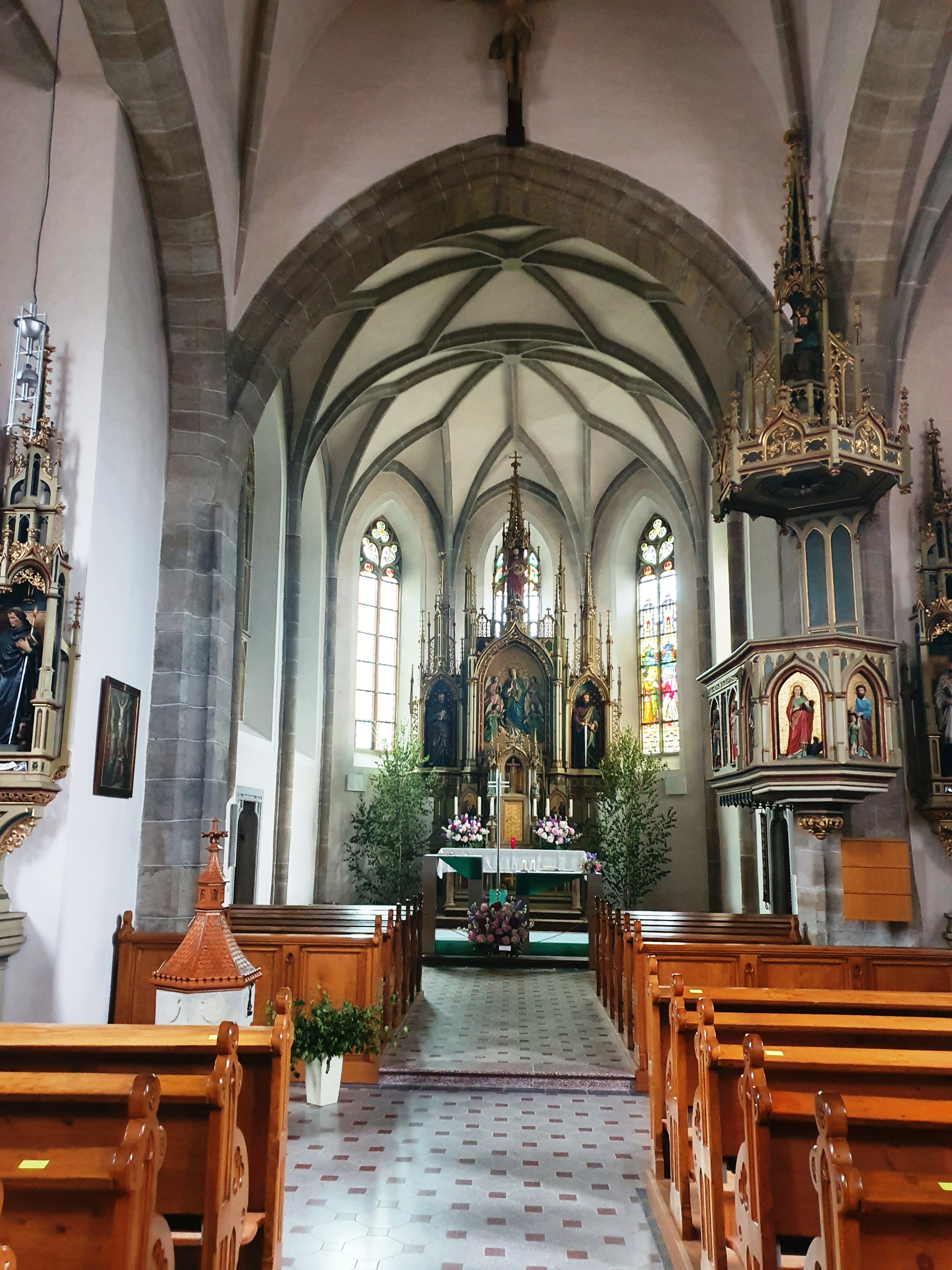 Hochaltar von 1871 im Chor